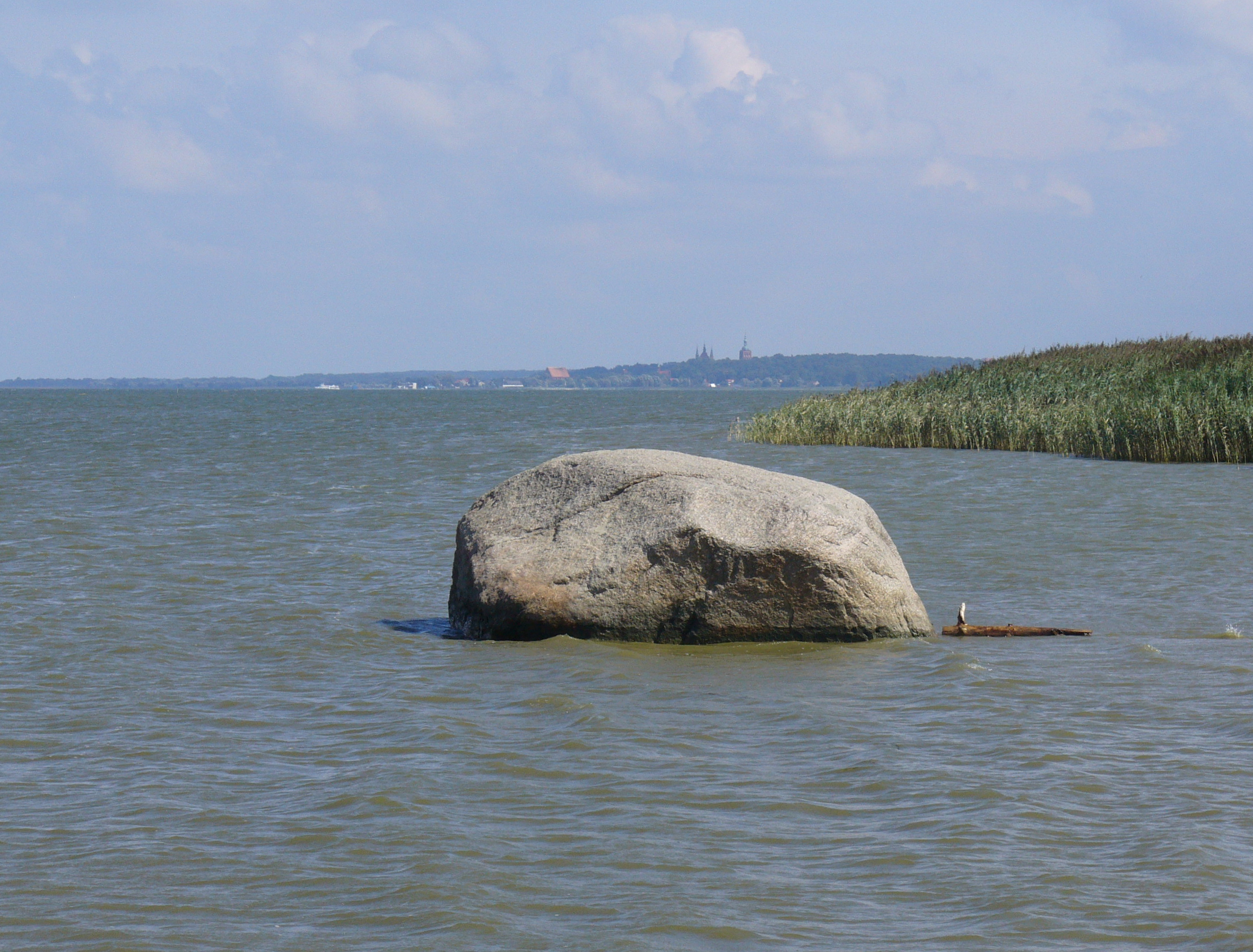 Święty Kamień - głaz narzutowy leżący w wodach Zalewu Wiślanego pomiędzy Tolkmickiem a Fromborkiem.